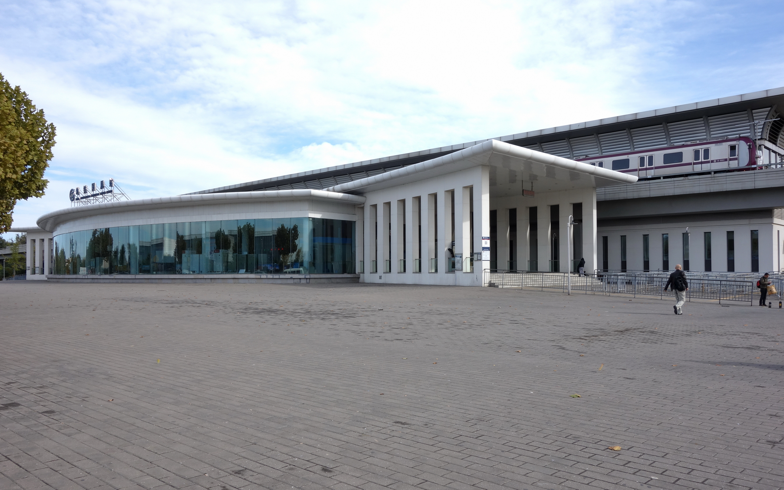 北京地铁15号线国展站，该站为高架车站。